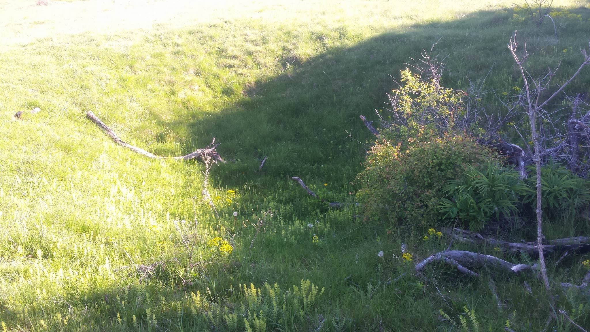 Unul dintre cele doua cuiburi de artilerie aflate pe varful dealului Pietris.